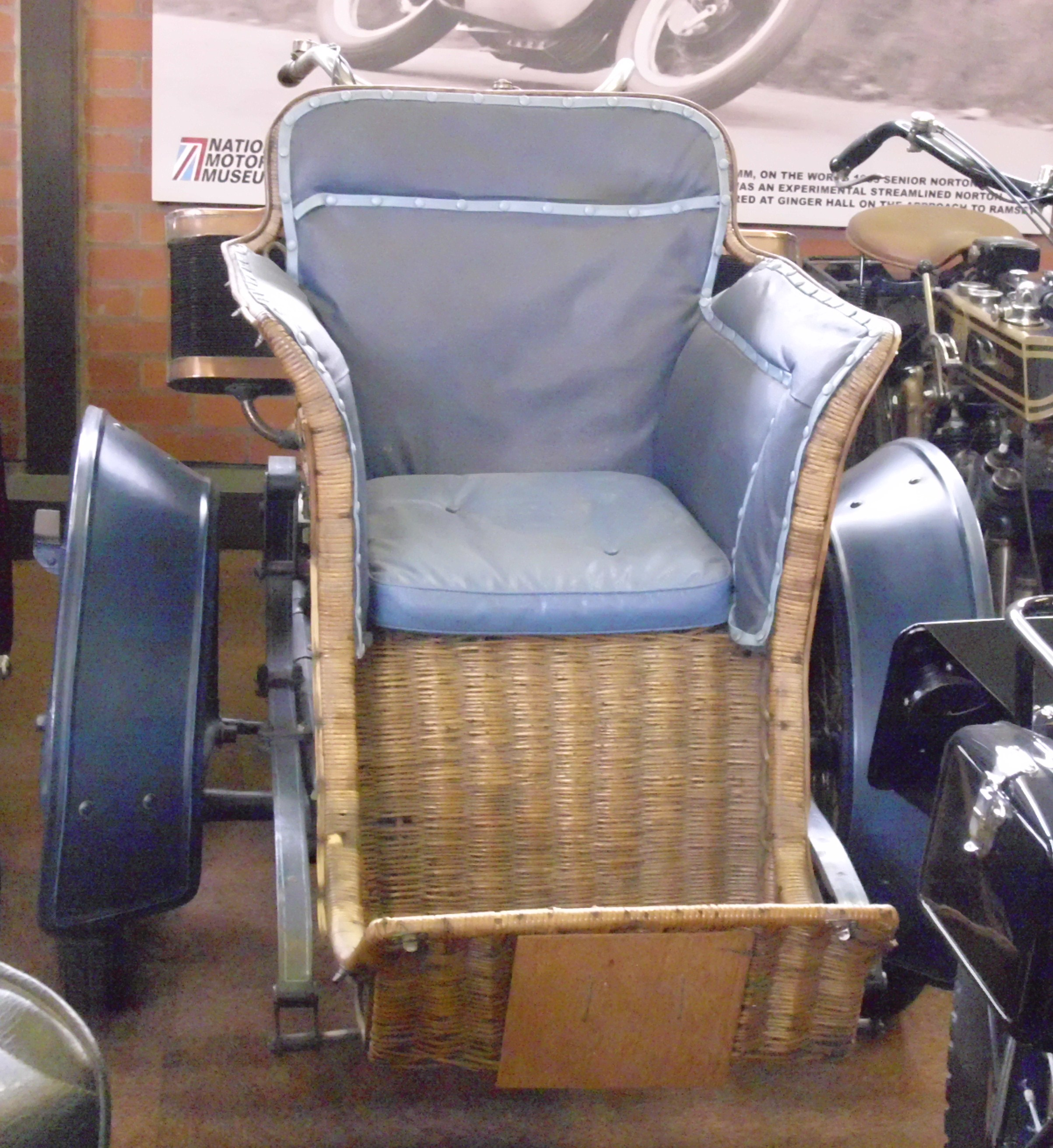 Garrard Forecar 1904